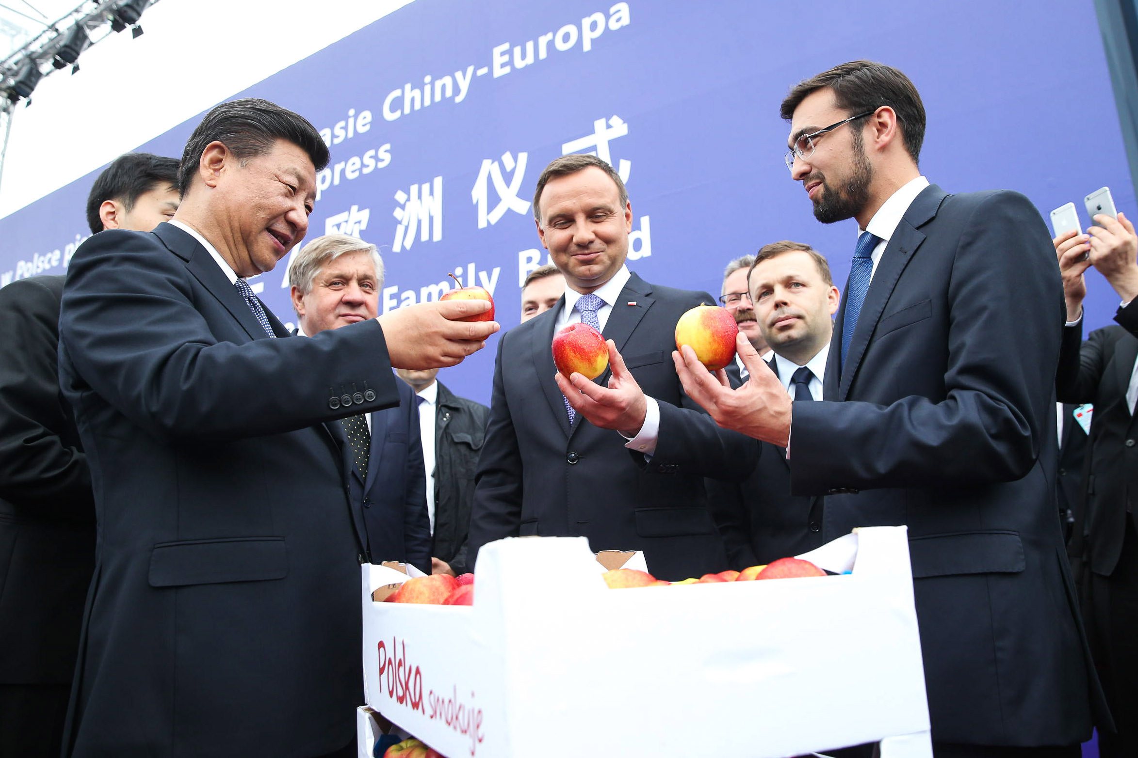 20/06/2016 Udział Prezydenta RP i Przewodniczącego ChRL w inauguracji połączenia kolejowego „China Railway Express”. Fot. Andrzej Hrechorowicz.